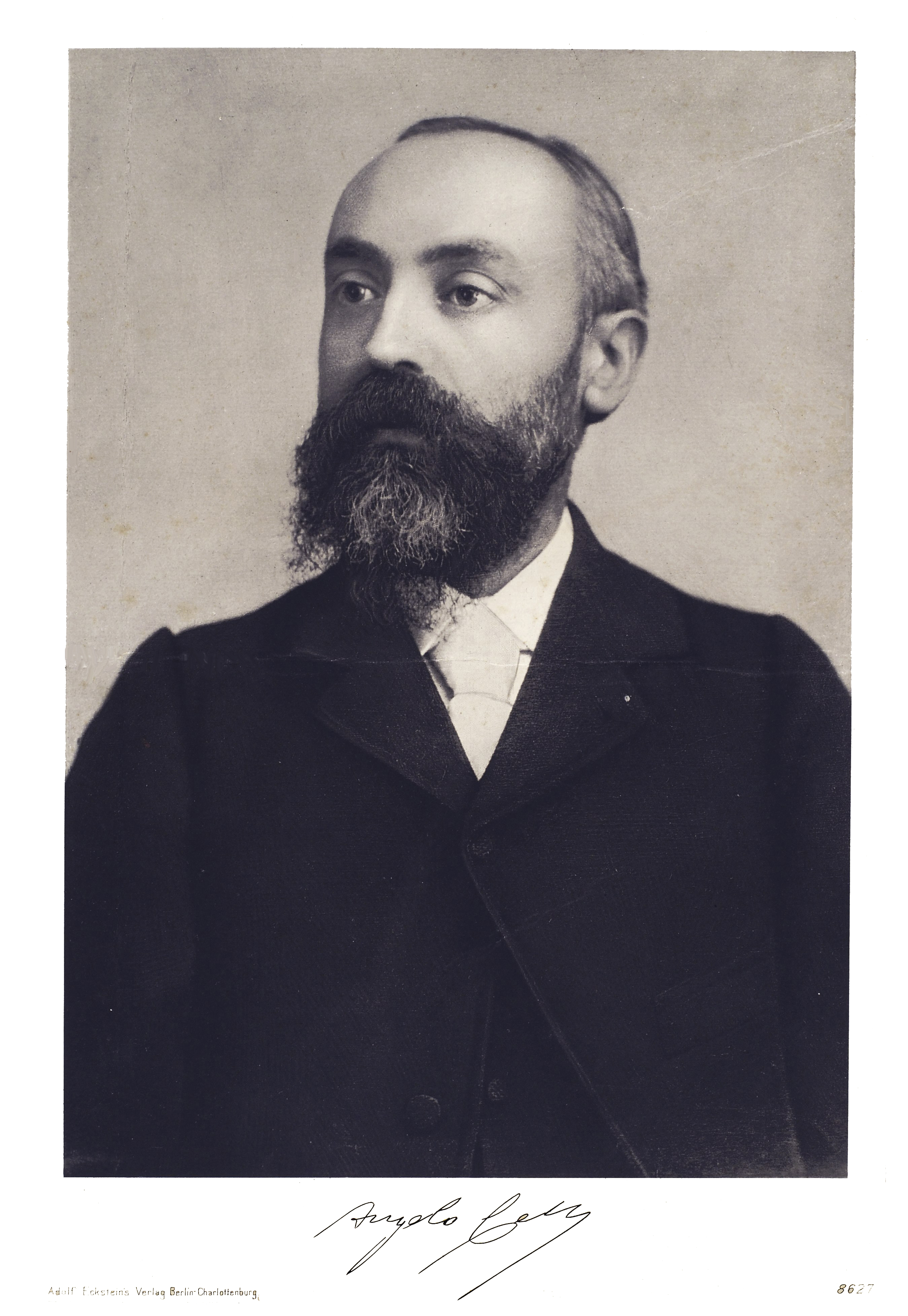 Portrait Angelo Celli